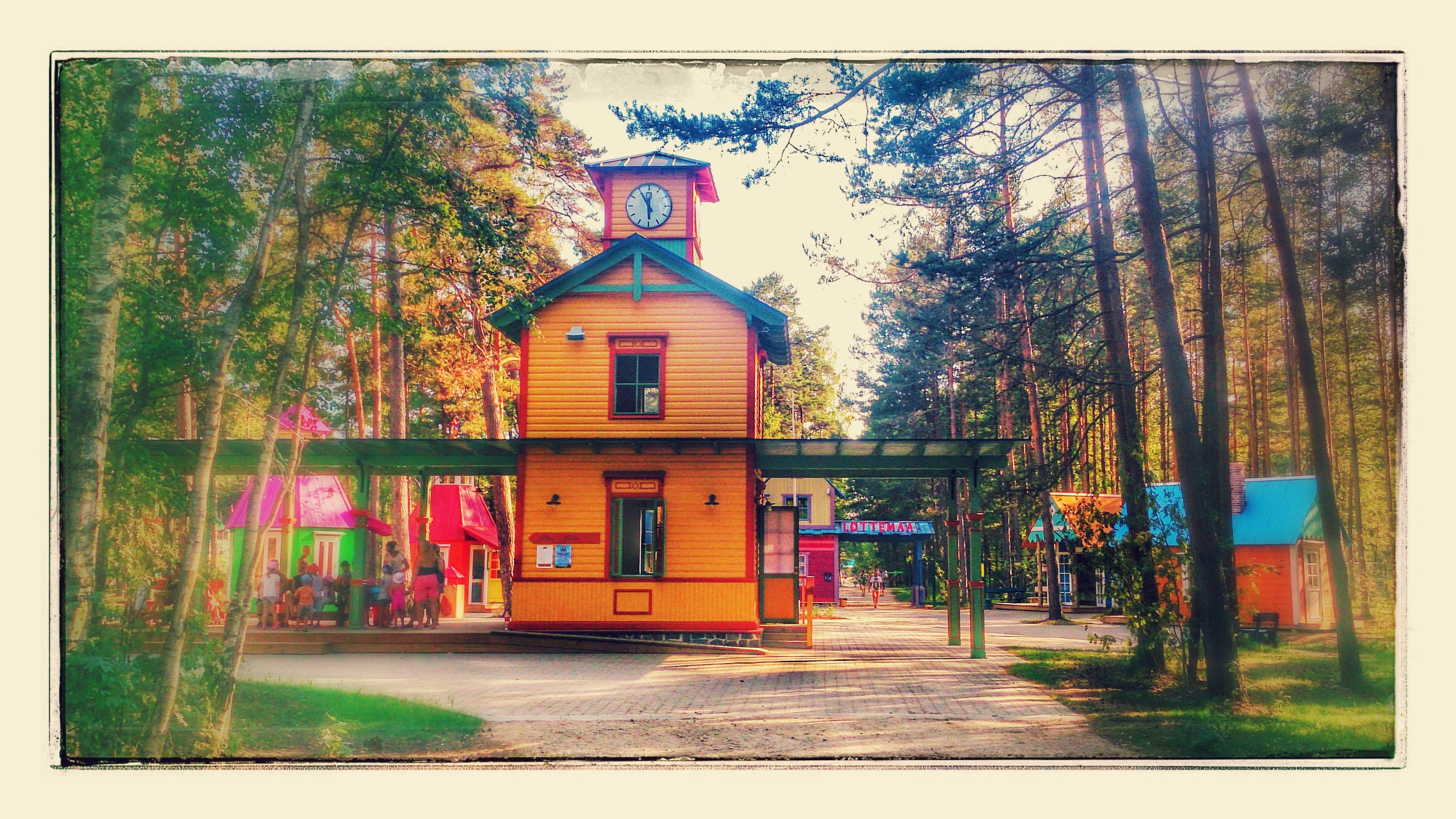 Lottemaa sissepääs.